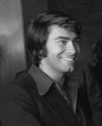 Title: Bonn, Bundeskanzler Brandt empfängt Schauspieler Extra information: Von rechts: Genscher, Brandt, Roy Black People in the image: Brandt, Willy: Bundeskanzler, Vorsitzender der SPD, Regierender Bürgermeister Berlin-West, Bundesrepublik Deutschland * Genscher, Hans-Dietrich: Außenminister, Innenminister, Vorsitzender der FDP, Bundesrepublik Deutschland * Black, Roy: Schlagersänger, Bundesrepublik Deutschland Factual corrections and alternative descriptions are encouraged separately from the original description. Additionally errors can be reported at this page to inform the Bundesarchiv. Original historic description: Bundeskanzler Willy Brandt empfängt Filmschauspieler